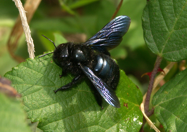 Xylocope bleu (Xylocopa iris) posé sur une feuille de ronce.